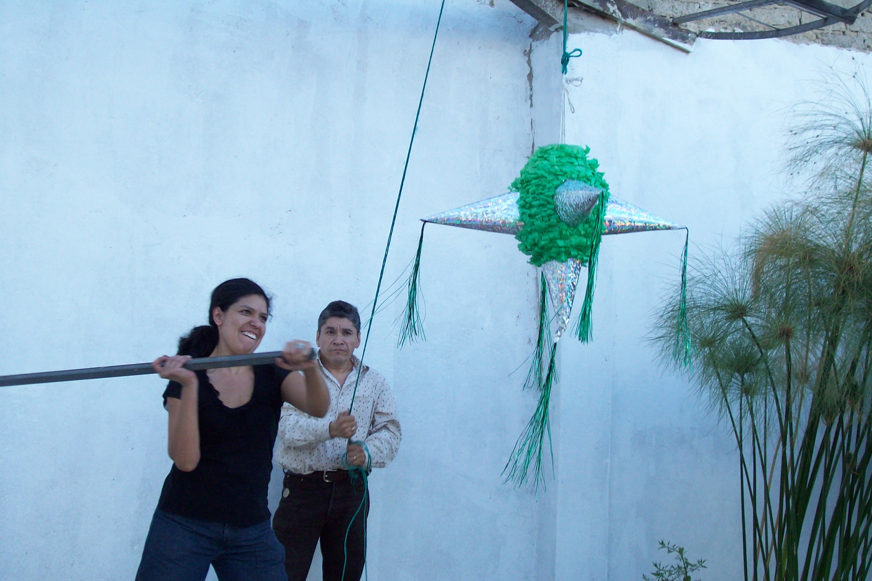 Dum Esperanto-renkontiĝo en Guadalajara Meksiko oni batas la verdstelan pinjaton.